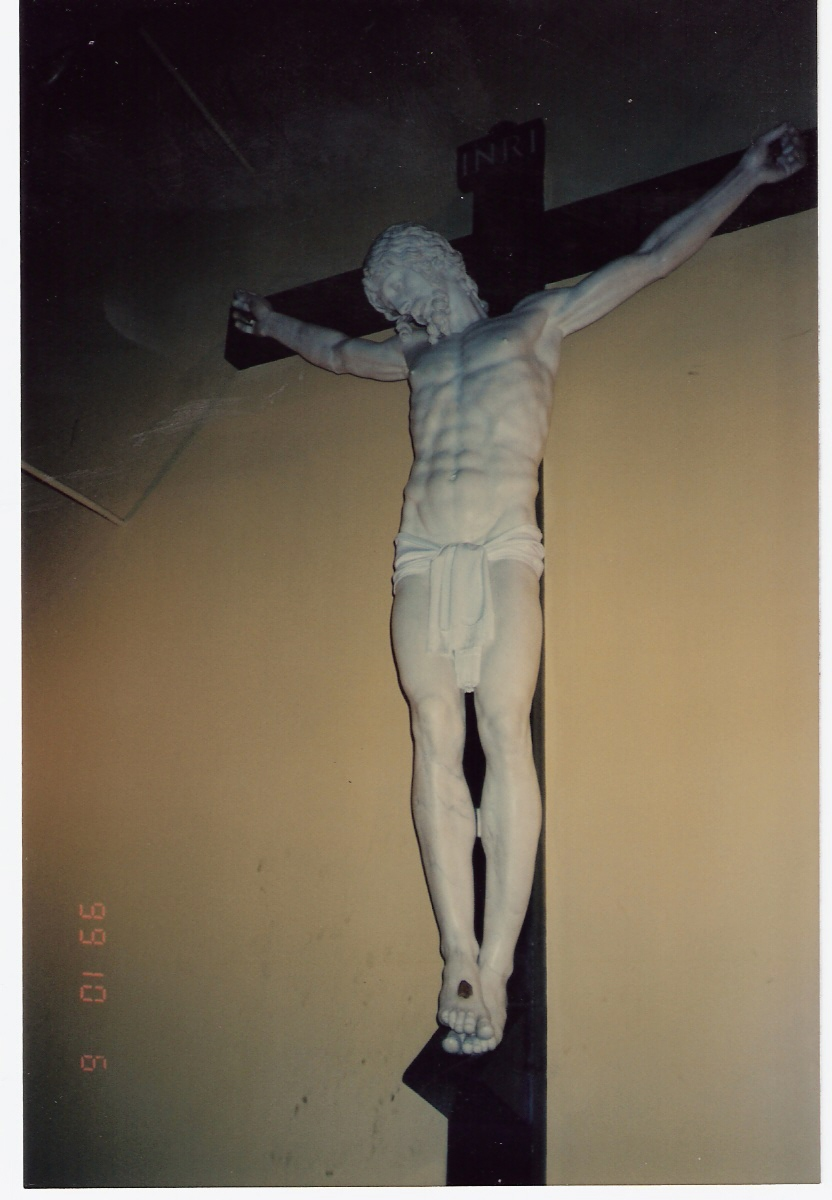 Benvenuto Cellini's Crucifix in el Escorial, Spain